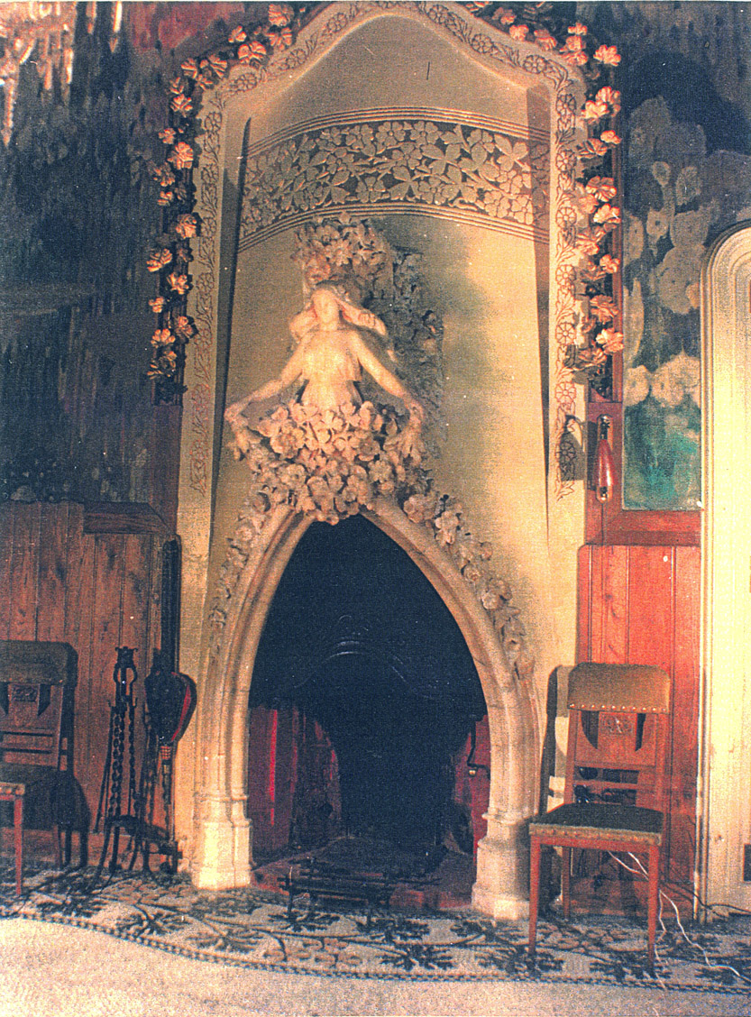 Detalle de la chimenea de alabastro hecha por Llimona para la casa Trinxet